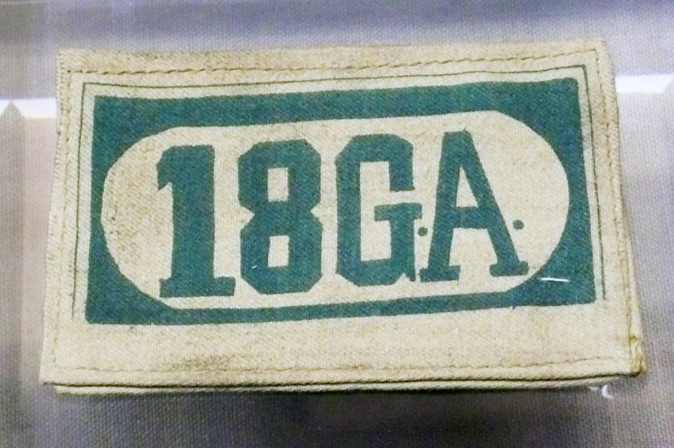 八路军臂章。